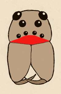 Widok przedni na karapaks i szczękoczułki pogońcowatego z nadustkiem pokolorawanym na czerwono